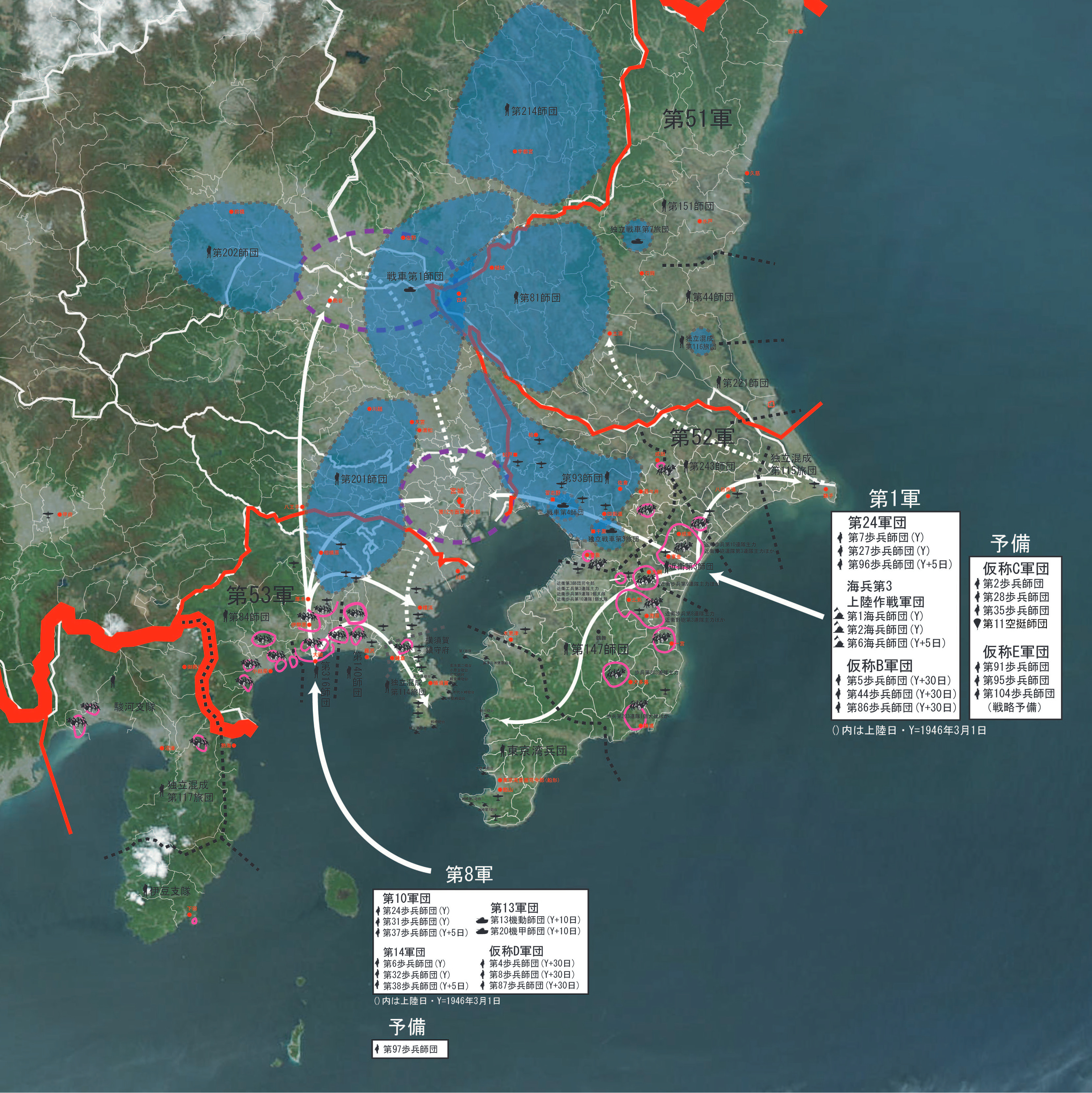 File:Satellite image of Japan in May 2003.jpg の衛星写真上に日米両軍のスケジュールと配置を明記したもの。